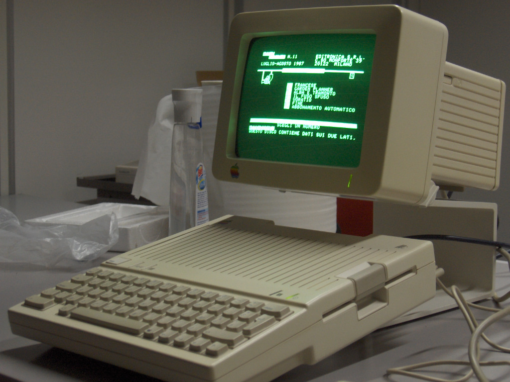 Elaboratore Apple IIc in funzione